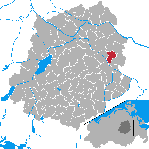 Daberkow, Landkreis Demmin, Mecklenburg-Vorpommern